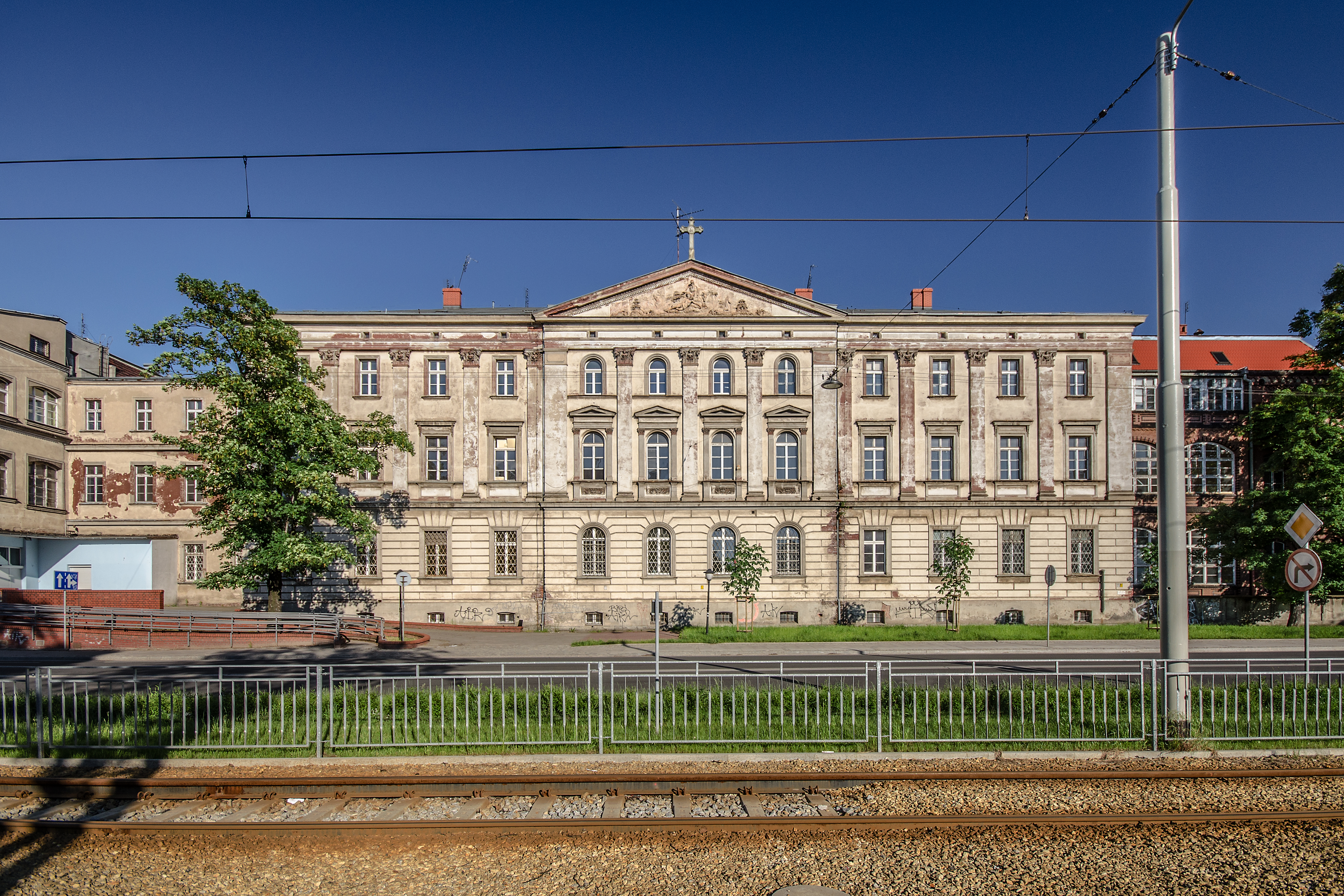 Wrocław, klasztor i szpital oo. Bonifratrów, ob. szpital kliniczny UM, 1714-36, XIX, XX